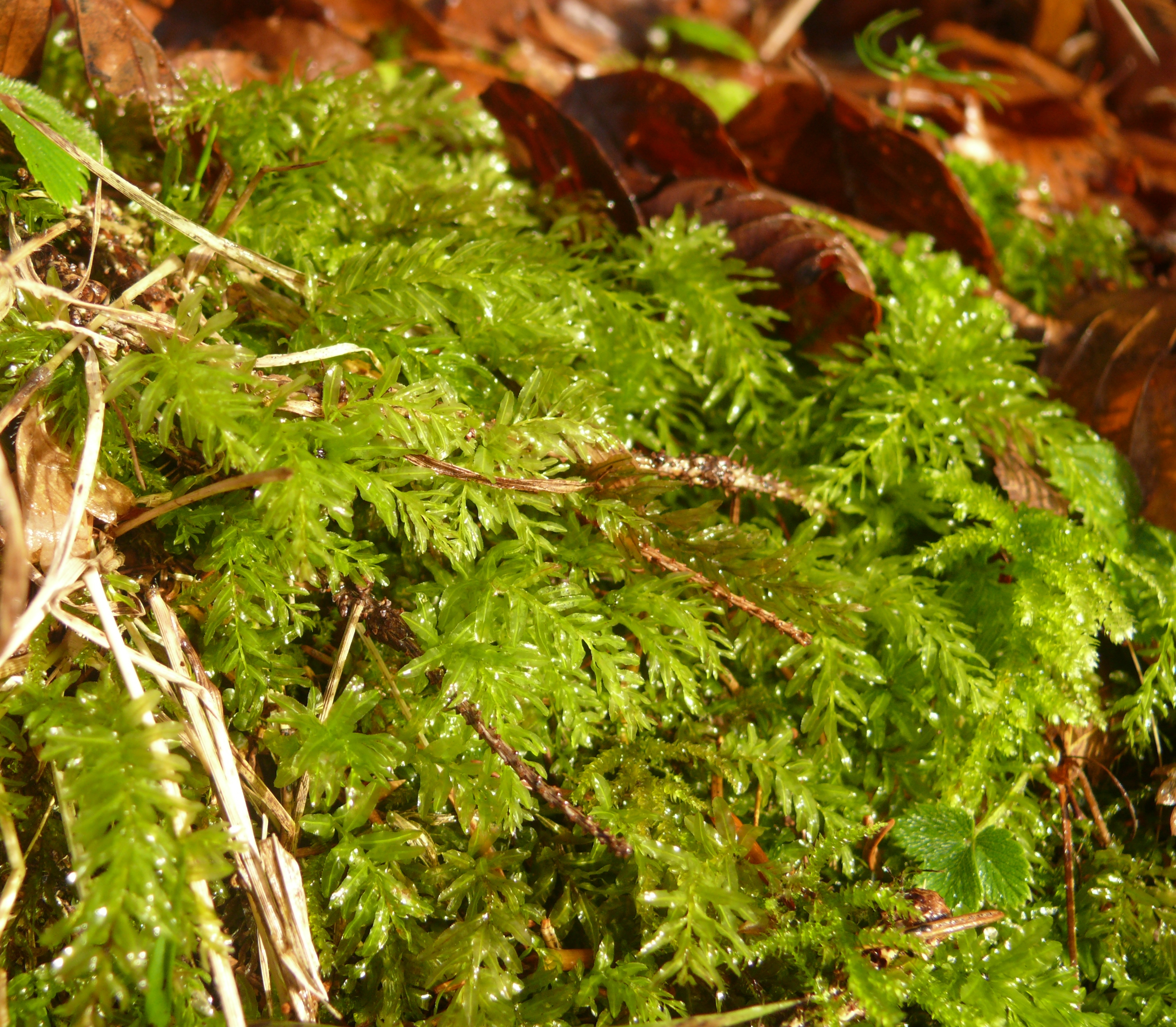 Plagiomnium undulatum, Schwäbisch-Fränkische Waldberge, Germany